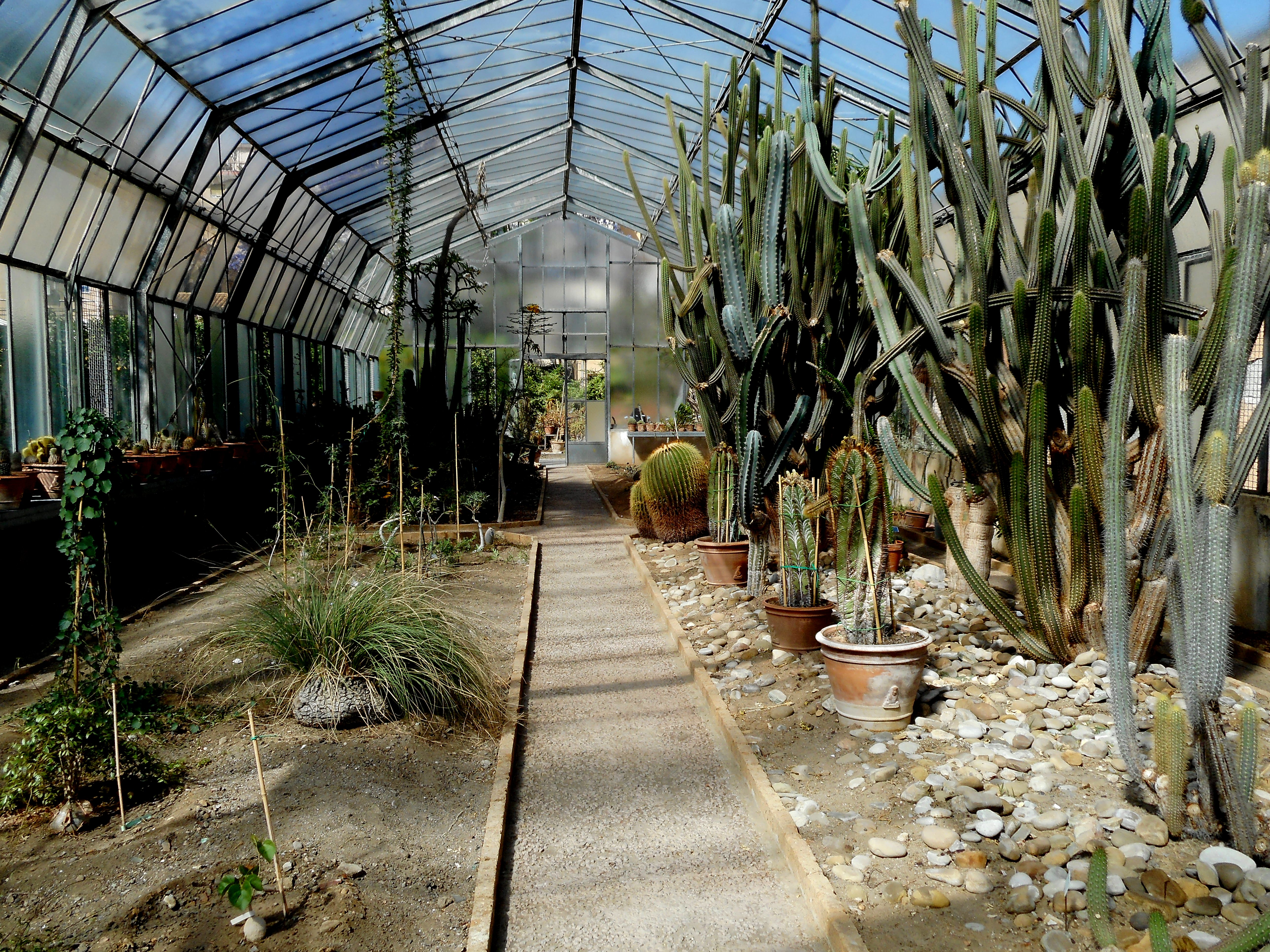 Interno della Serra delle succulente nell'Orto botanico di Palermo